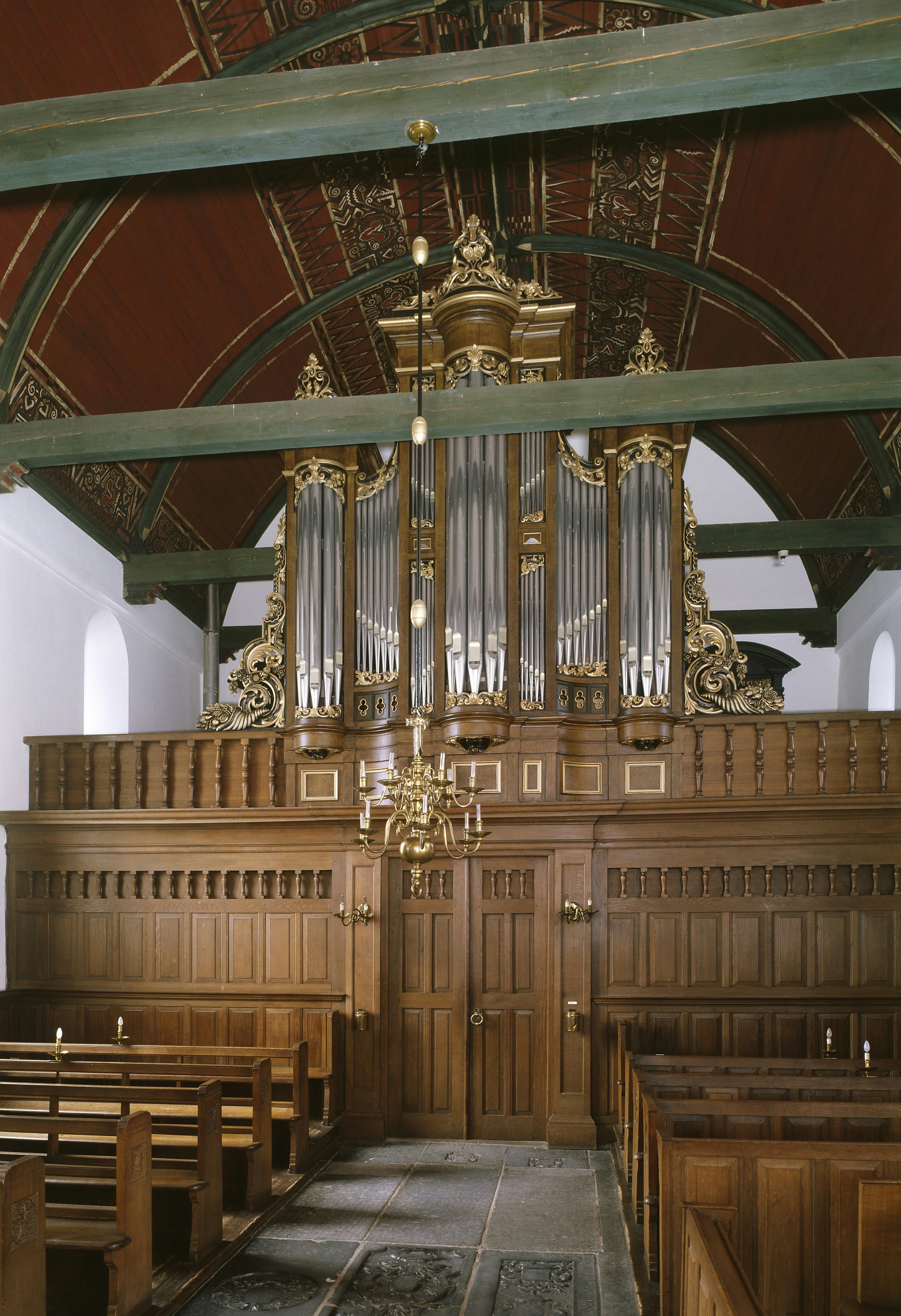 Nederlands Hervormde Kerk: Intenieur, aanzicht orgel, orgelnummer 21487 (opmerking: Gefotografeerd voor Het Historische Orgel in Nederland 1872-1878, bladzijde 211)